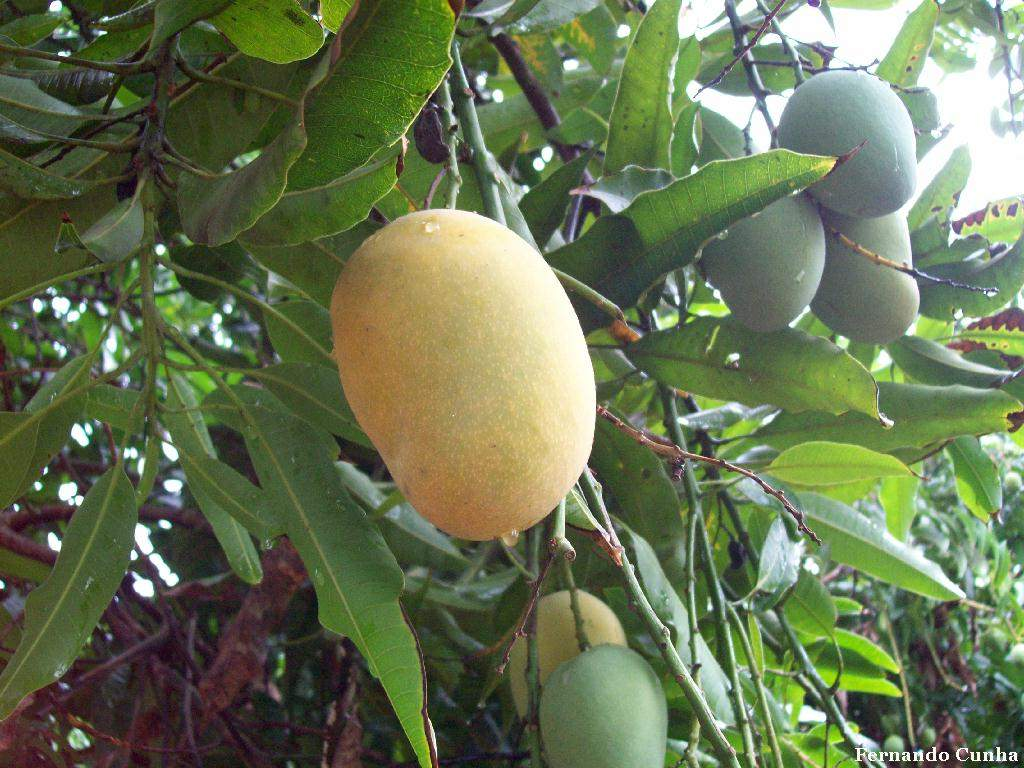 A saborosa manga.